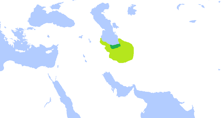 گسترش قلمرو باوندیان در دوران طلایی شاه غازی رستم چهارم